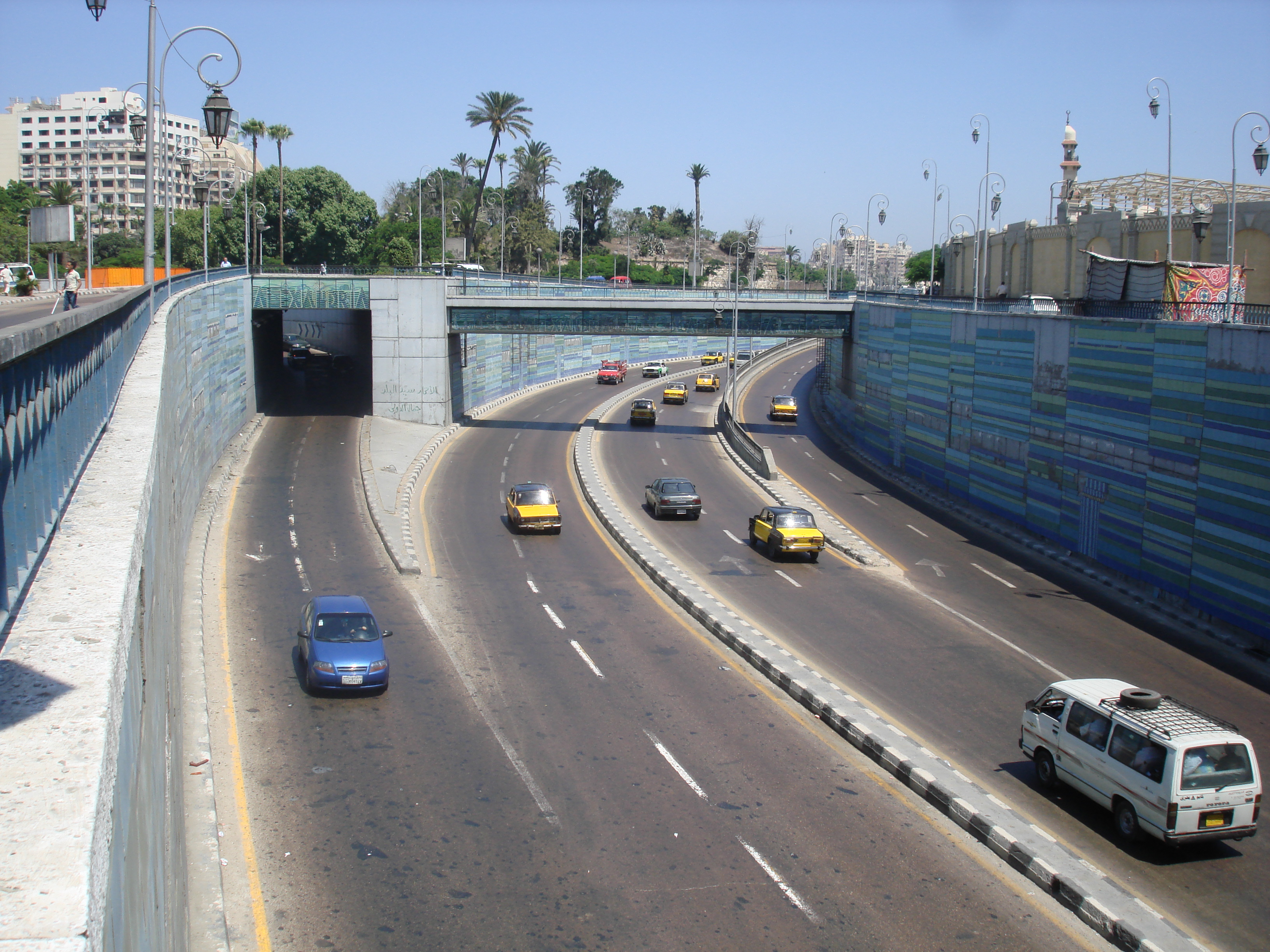 Abdel Moneim Reyad's underpath